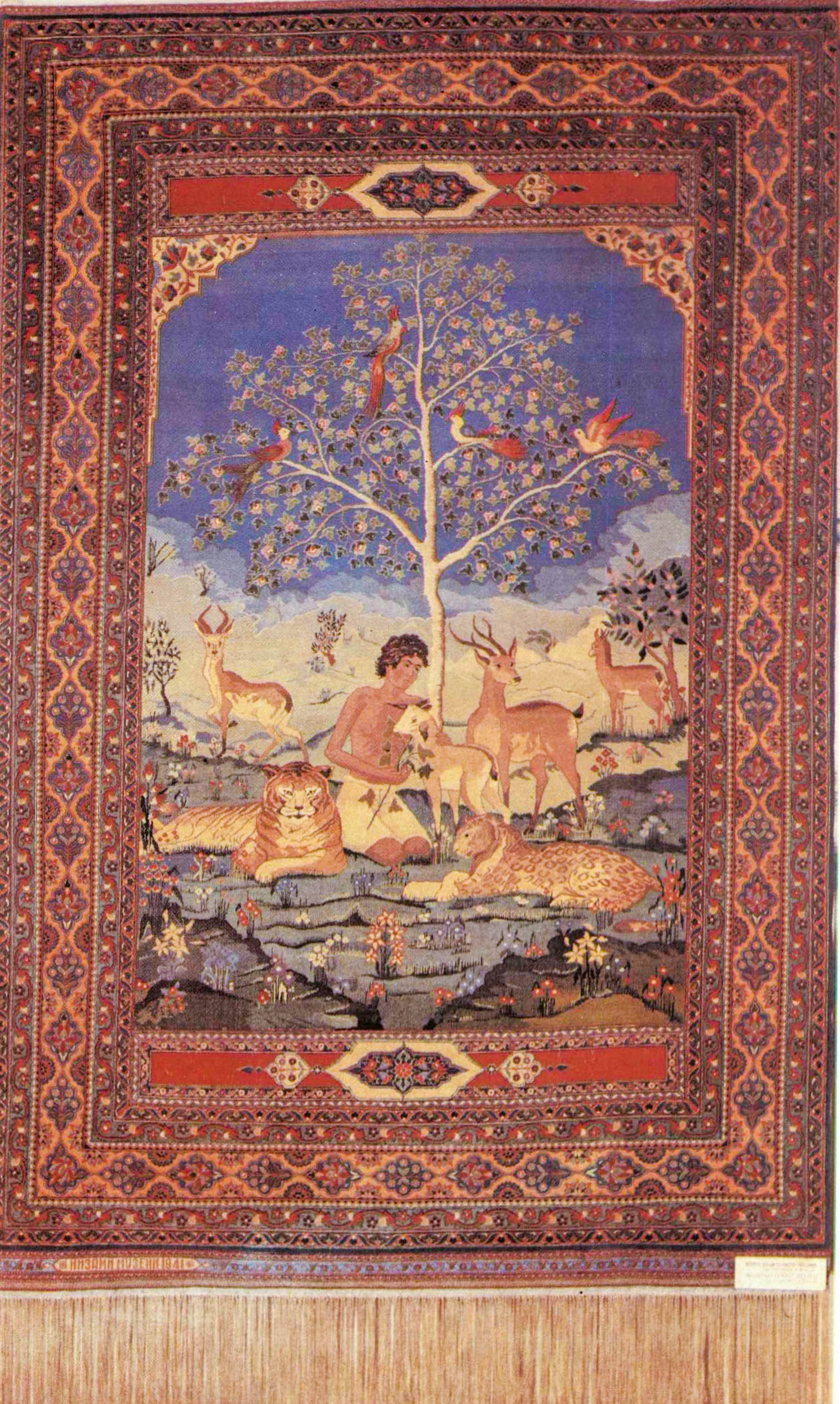 Məcnun heyvanlar arasınd, Lətif Kərimov, 1939, Azərbaycan ədəbiyyat muzeyi